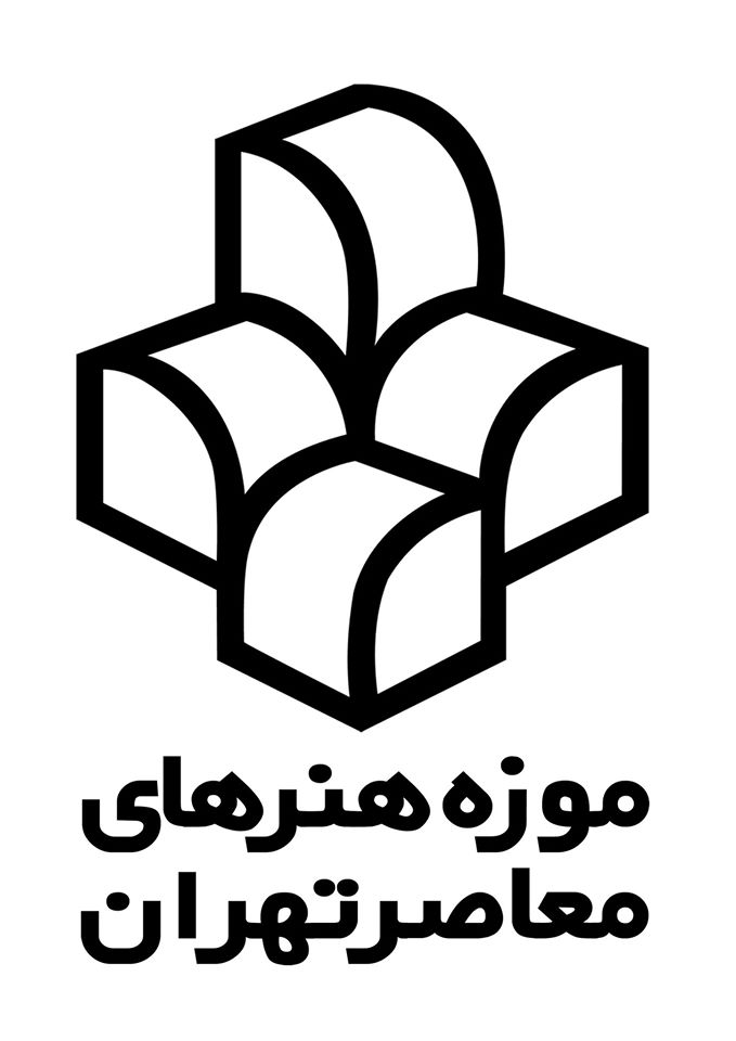 طراح آرم موزه هنرهای معاصر تهران: جواد پویان